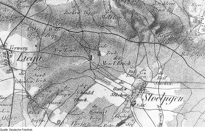 Original image description from the Deutsche Fotothek Schönfeld-Liega. Oberreit, Sect. Großenhain, 1841/43